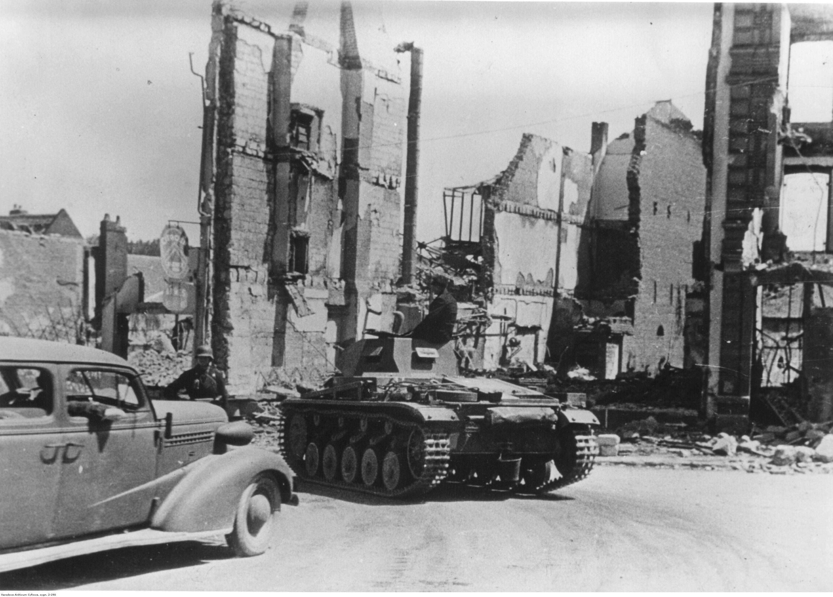 Czołg niemiecki PzKpfw II Ausf B wśród ruin.